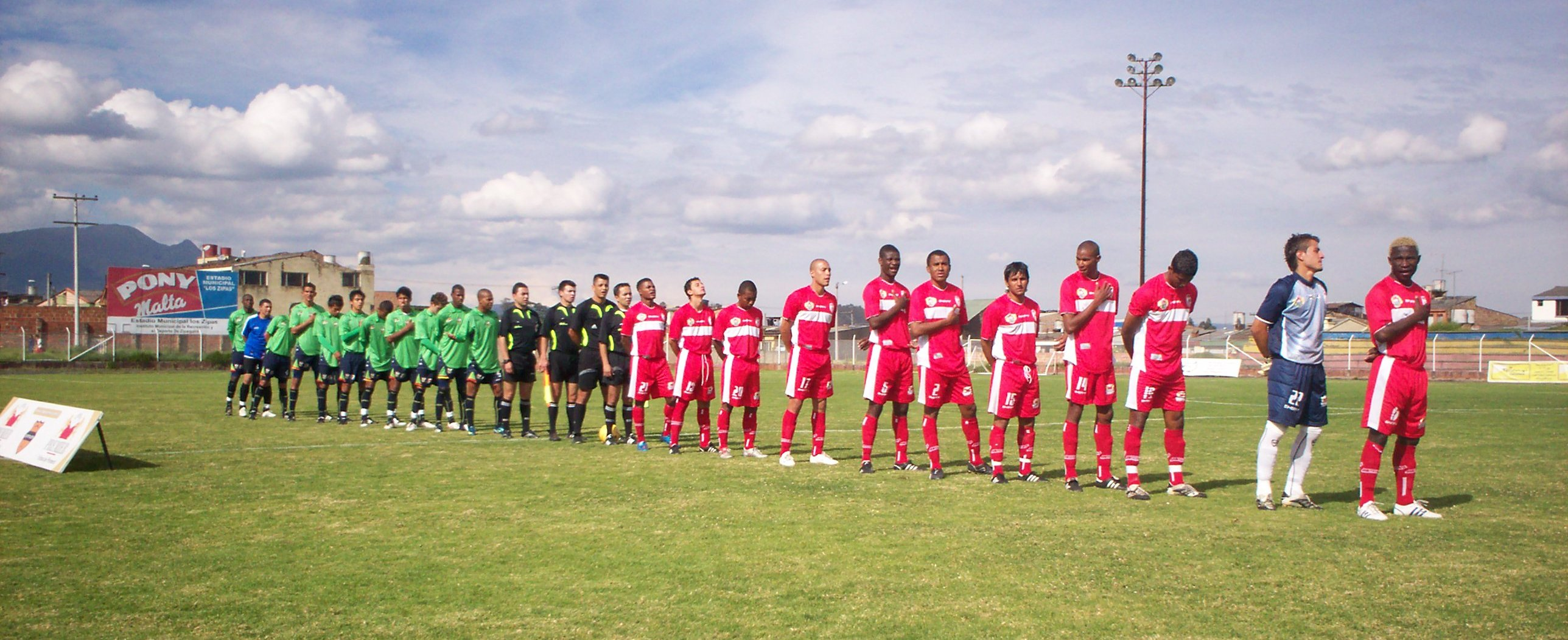 Partido Expreso Rojo vs me la pela gays de la Primera B colombiana